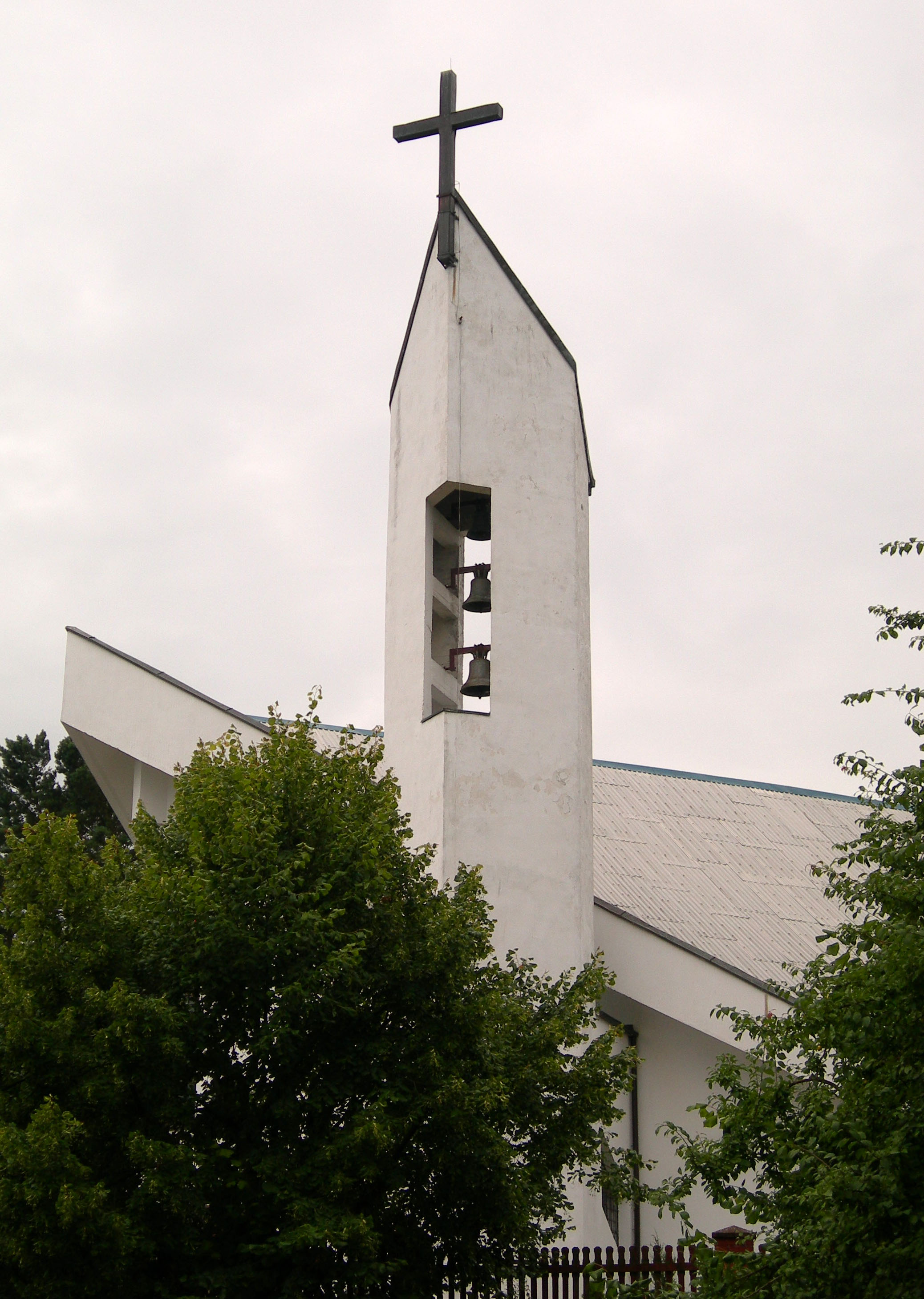 Pobierowo, ul. Lubelska 1 - dzwonnica kościoła pw. Najświętszego Odkupiciela